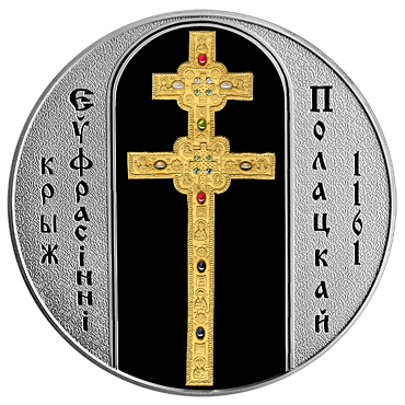 Монета Національного банку Білорусі номіналом 1 000 білоруських рублів "Хрест Єфросинії Полоцької"